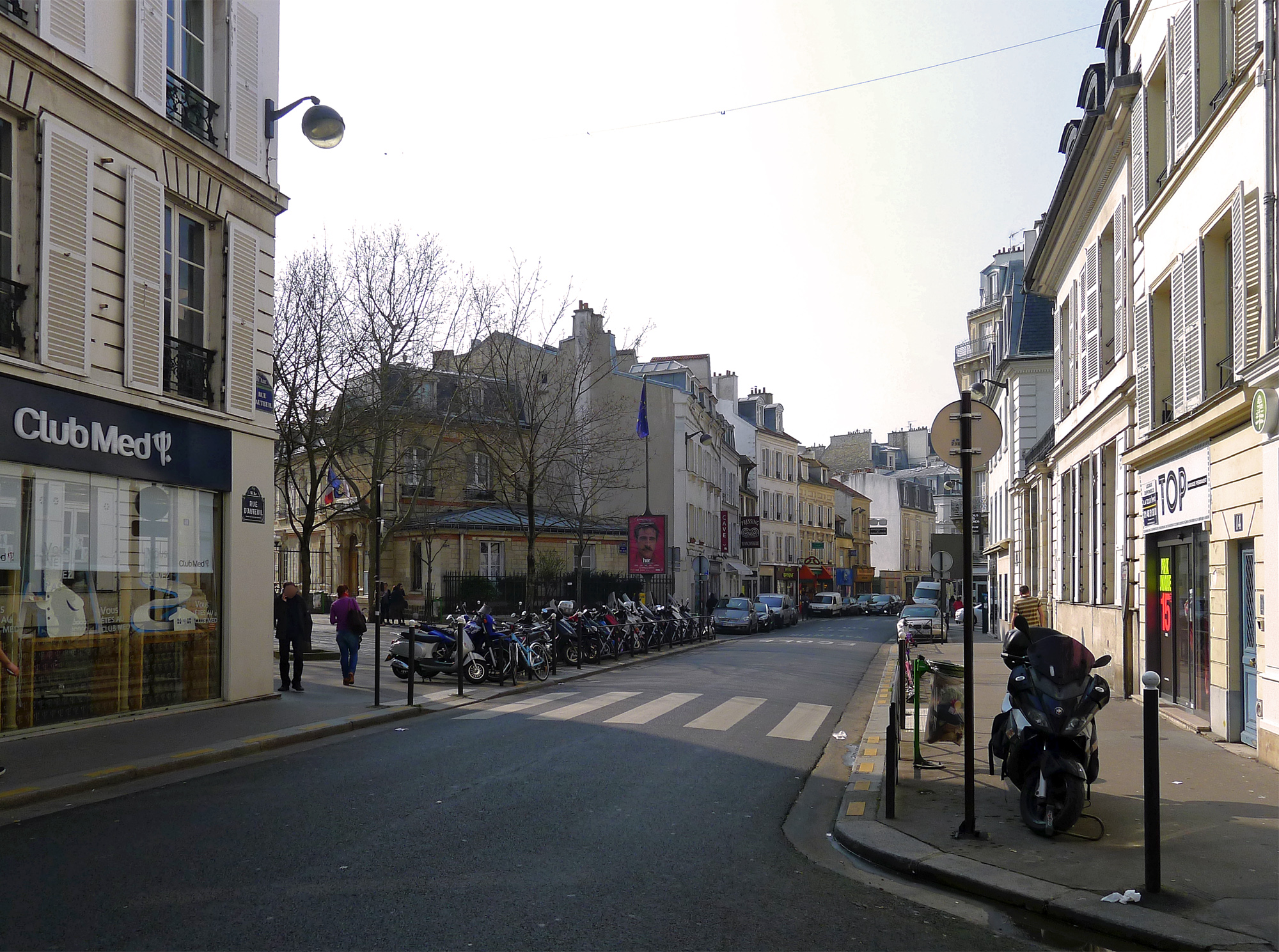 Rue d'Auteuil - Paris XVI